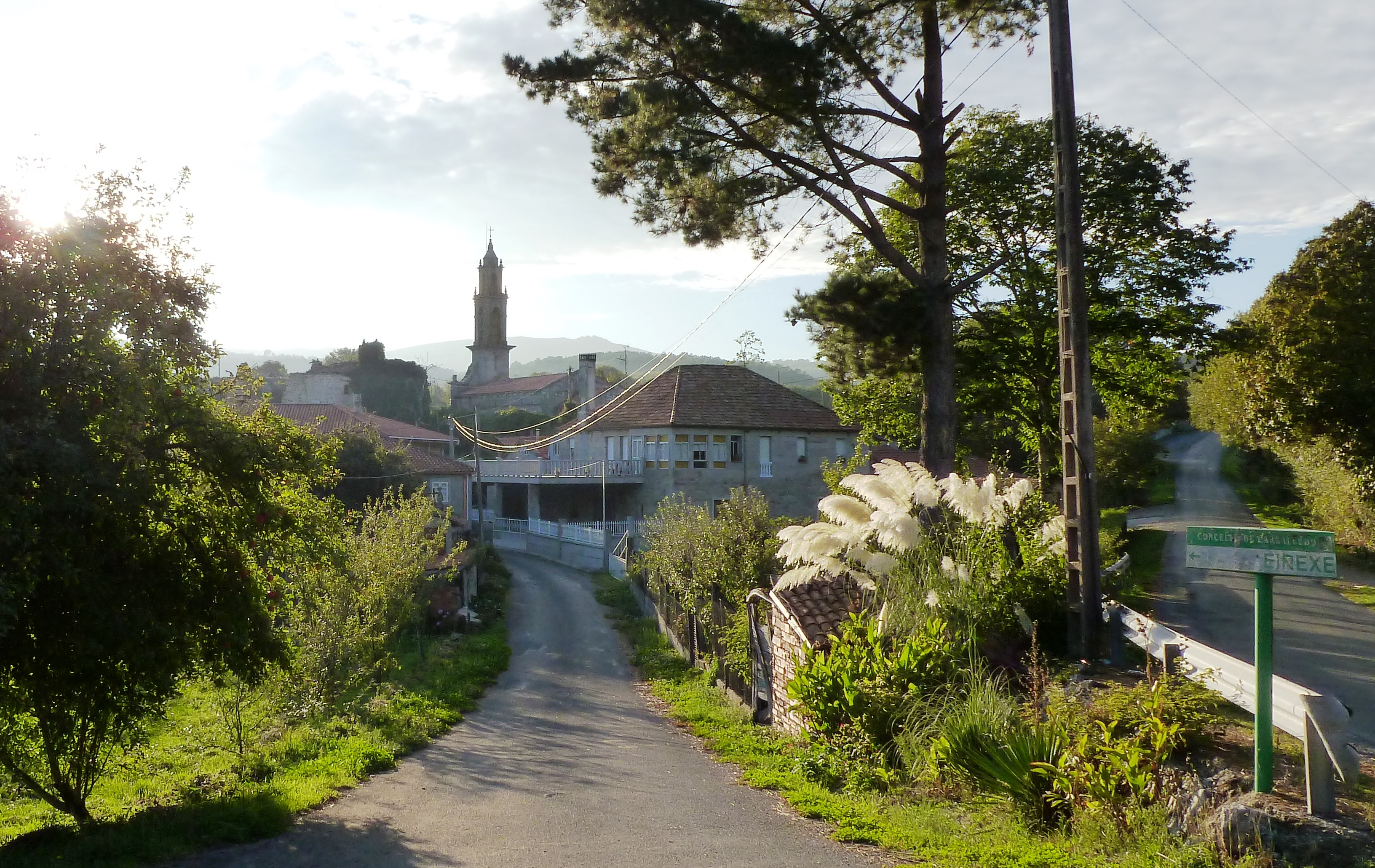 Entrada á Eirexe, Aguada, Carballedo